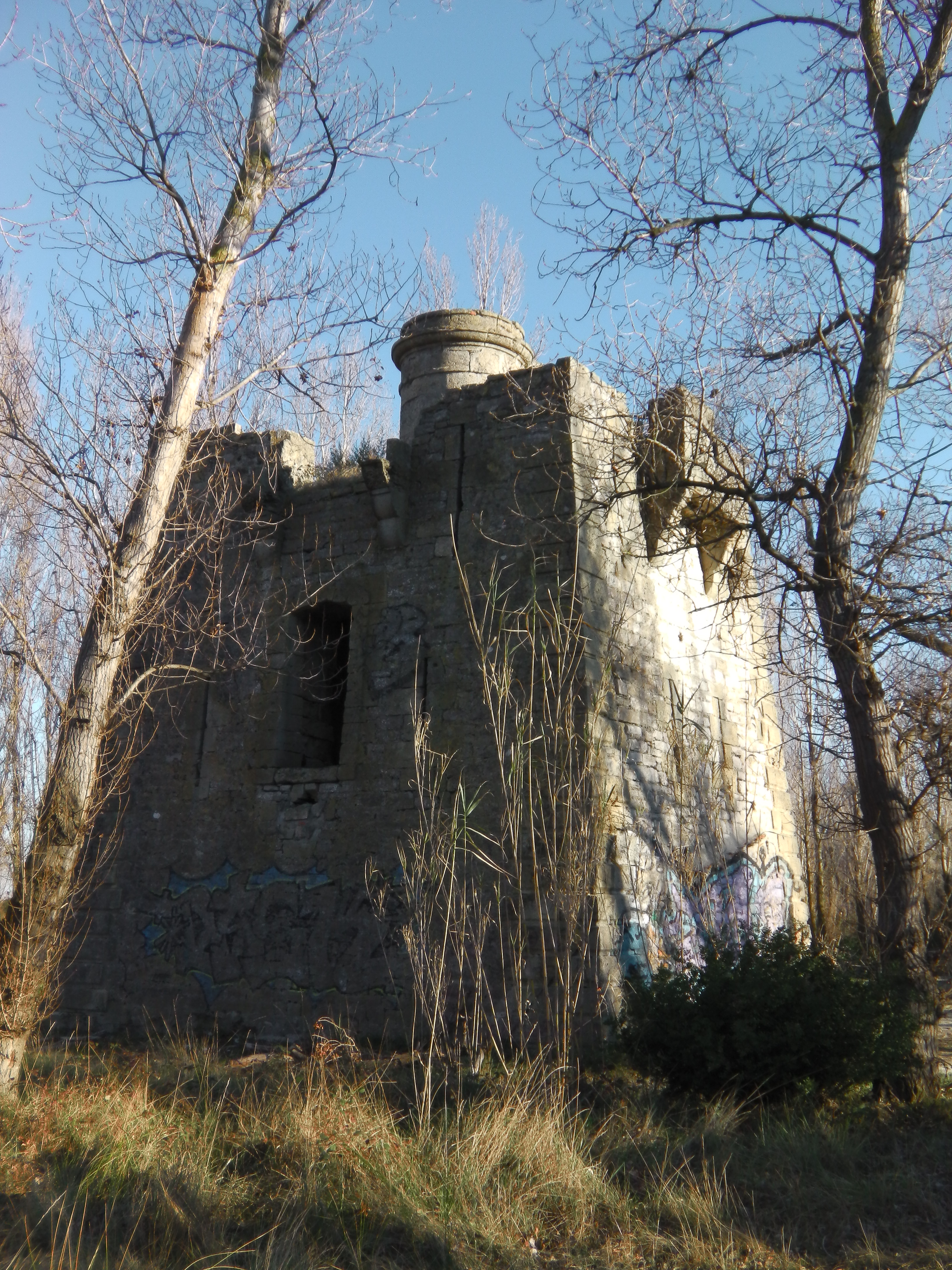 La Redoute du Grand-Travers (XVIIIème siècle) sur la commune de la Grande-Motte